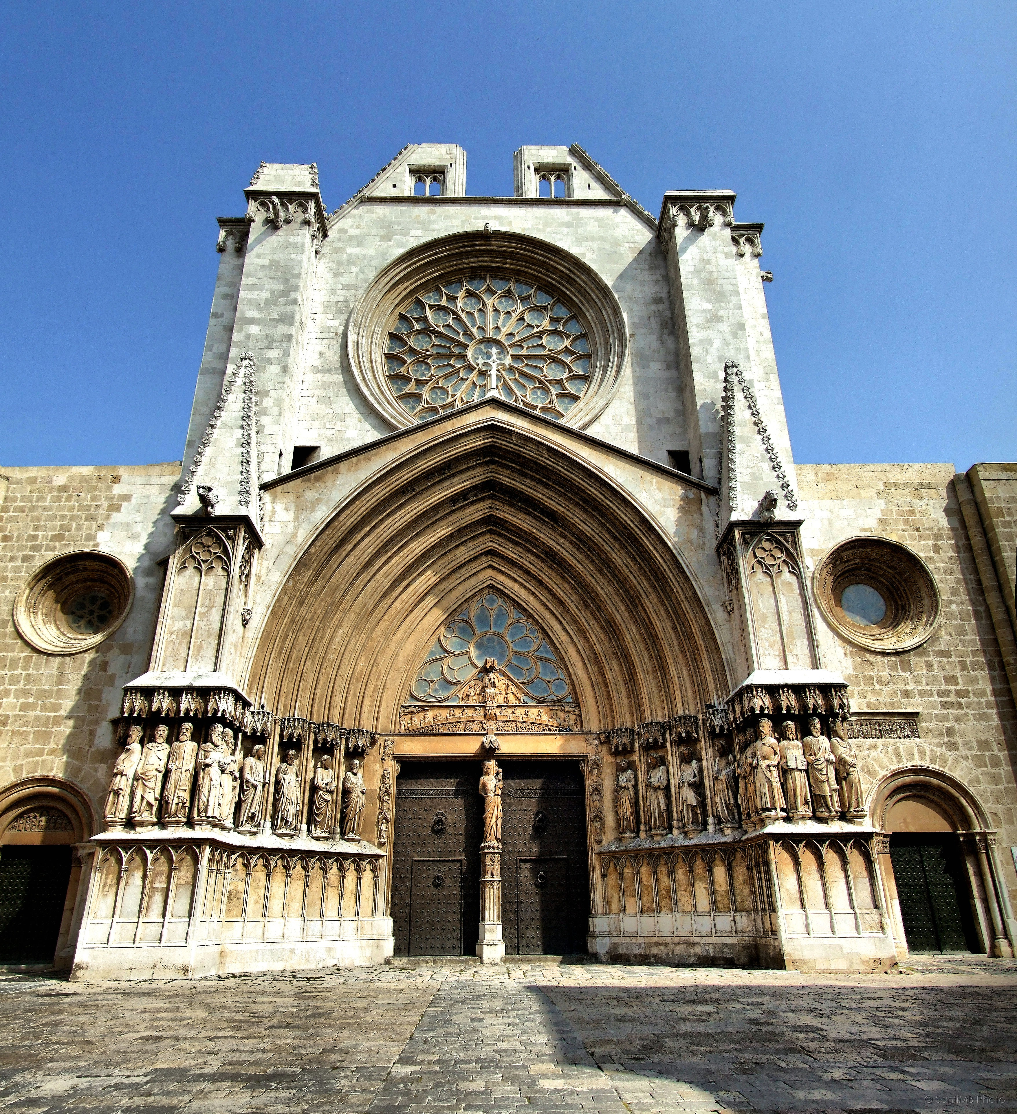 Catedral de Santa Maria (Tarragona)